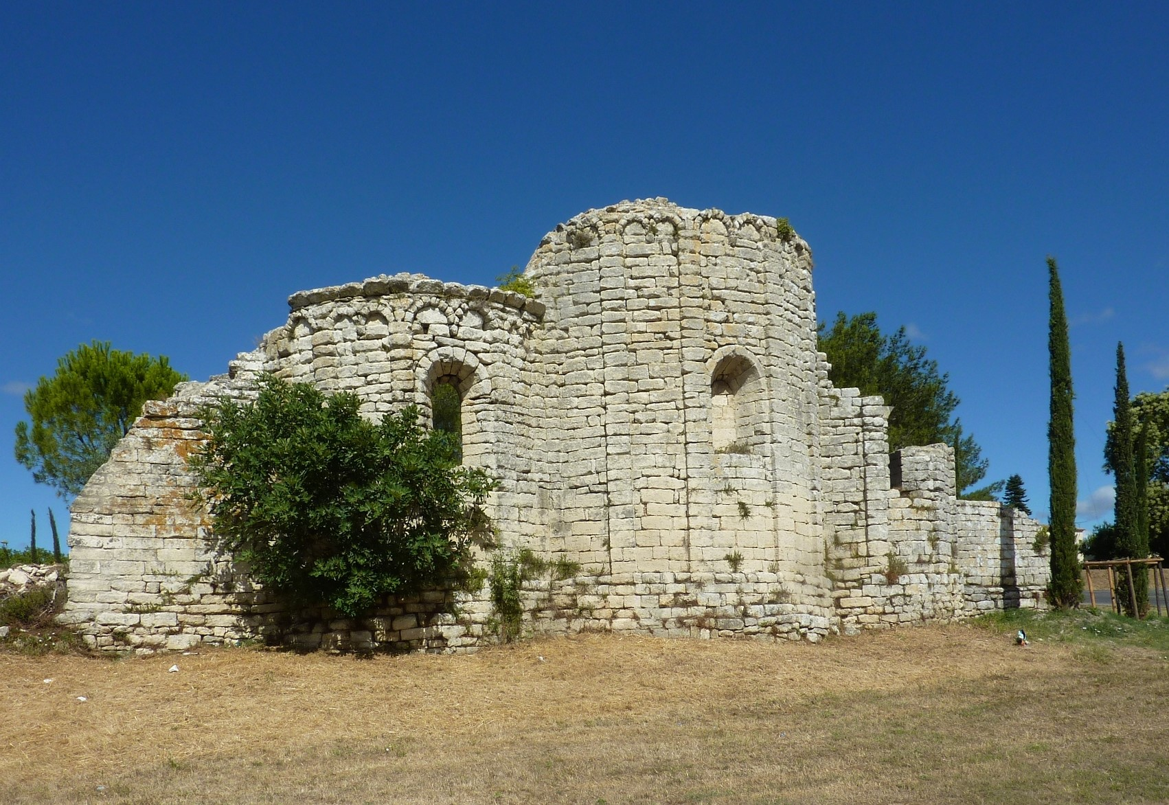 Église Saint-Géniès de Uzès